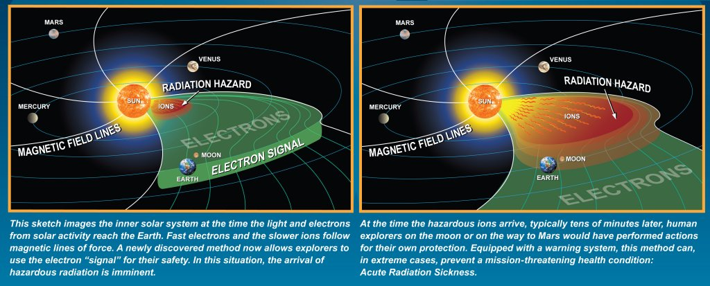 neue Methode Ionenstürme vorauszusagen